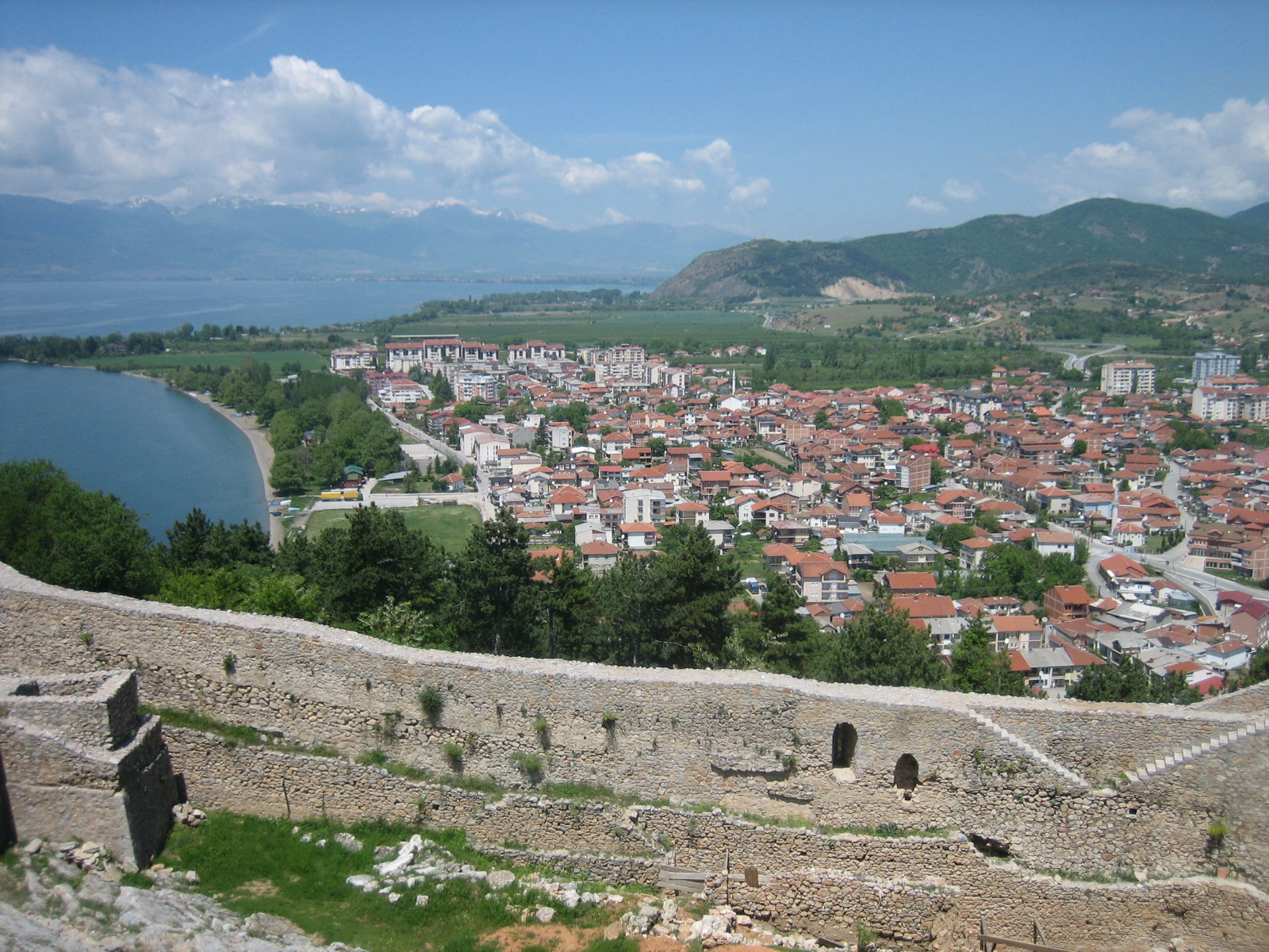 At Samuil's Fortress.